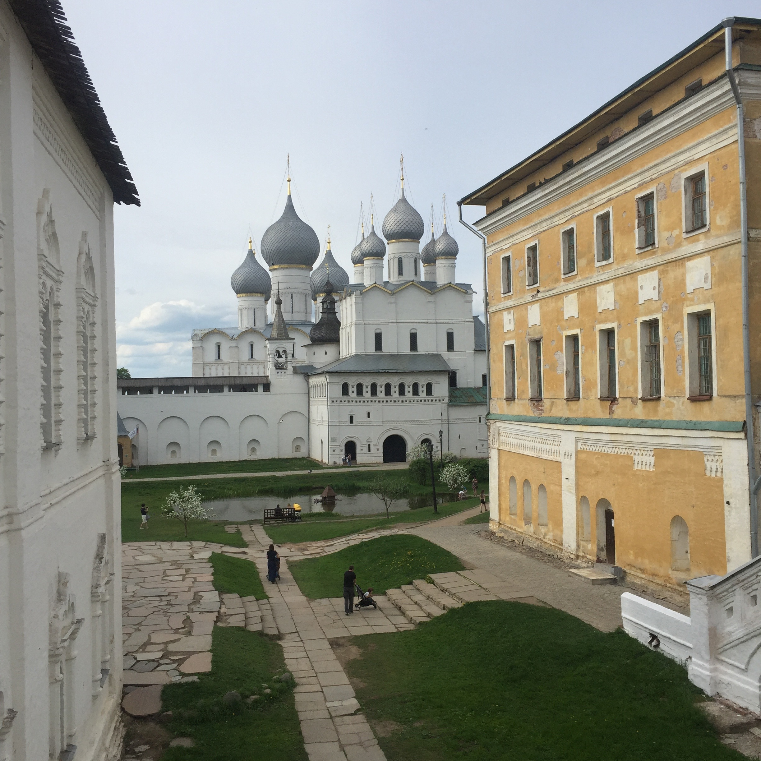 Rostow Kremlin